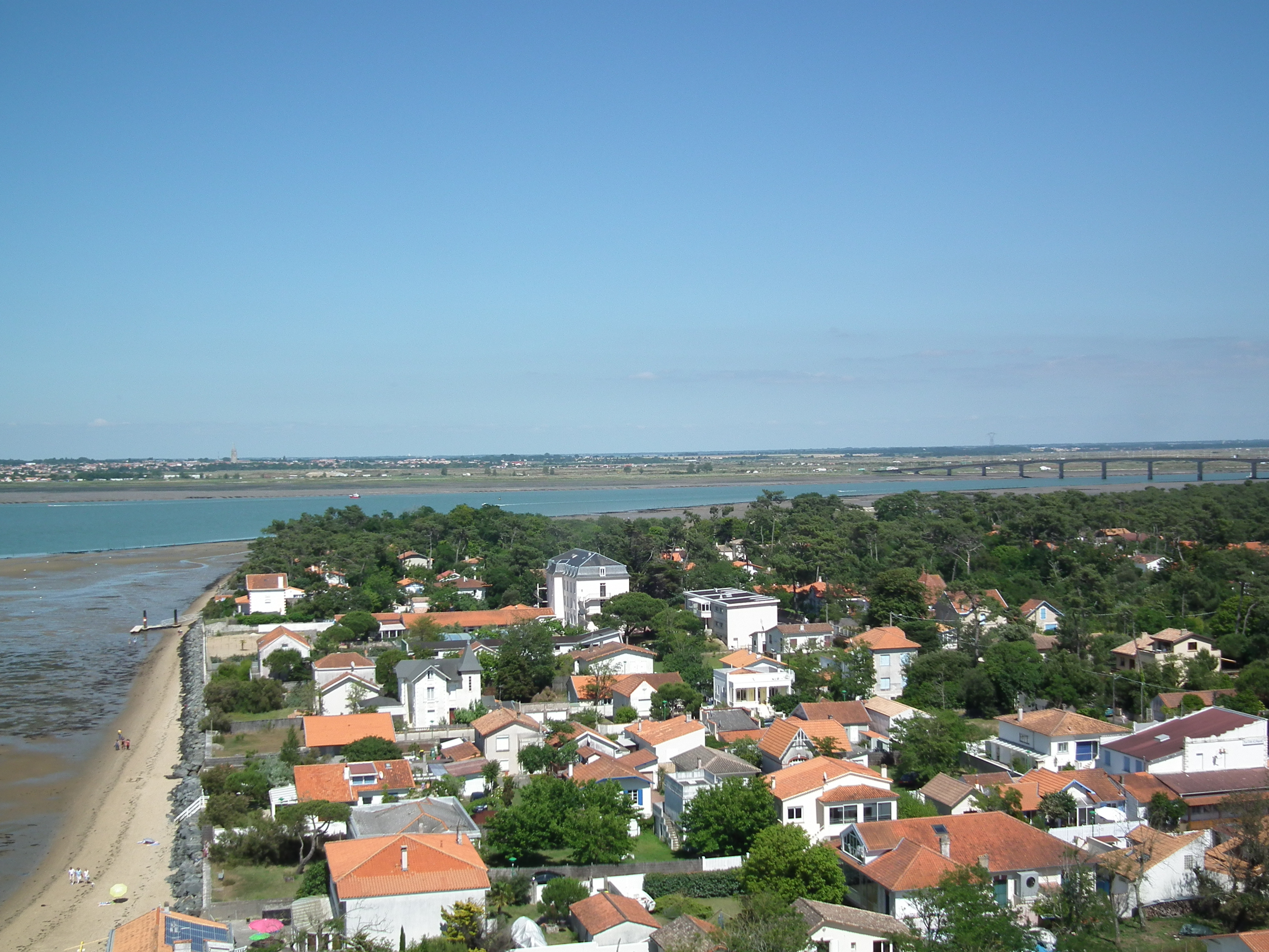 La station balnéaire de Ronce-les-Bains